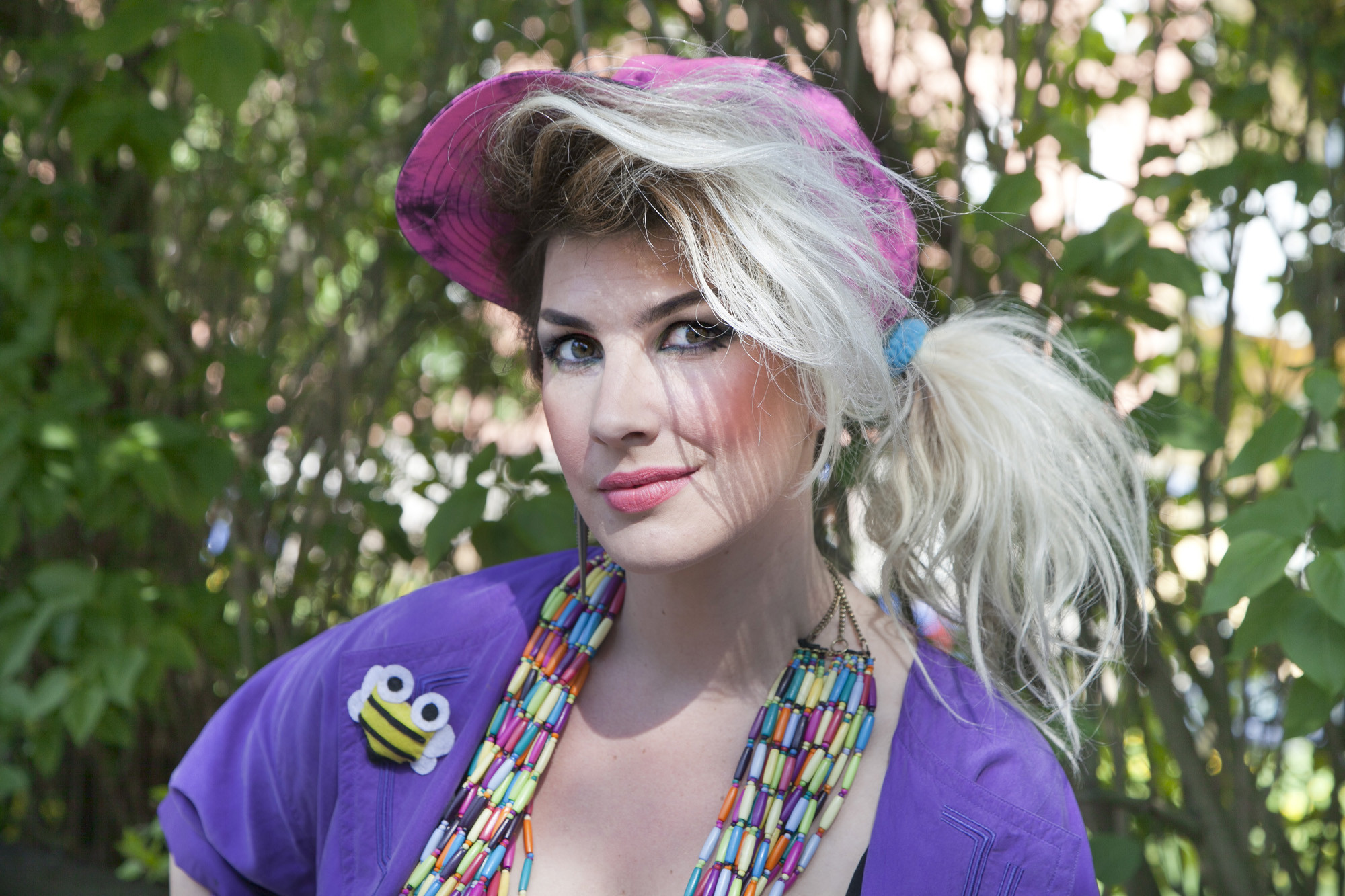 Programledaren Kitty Jutbring